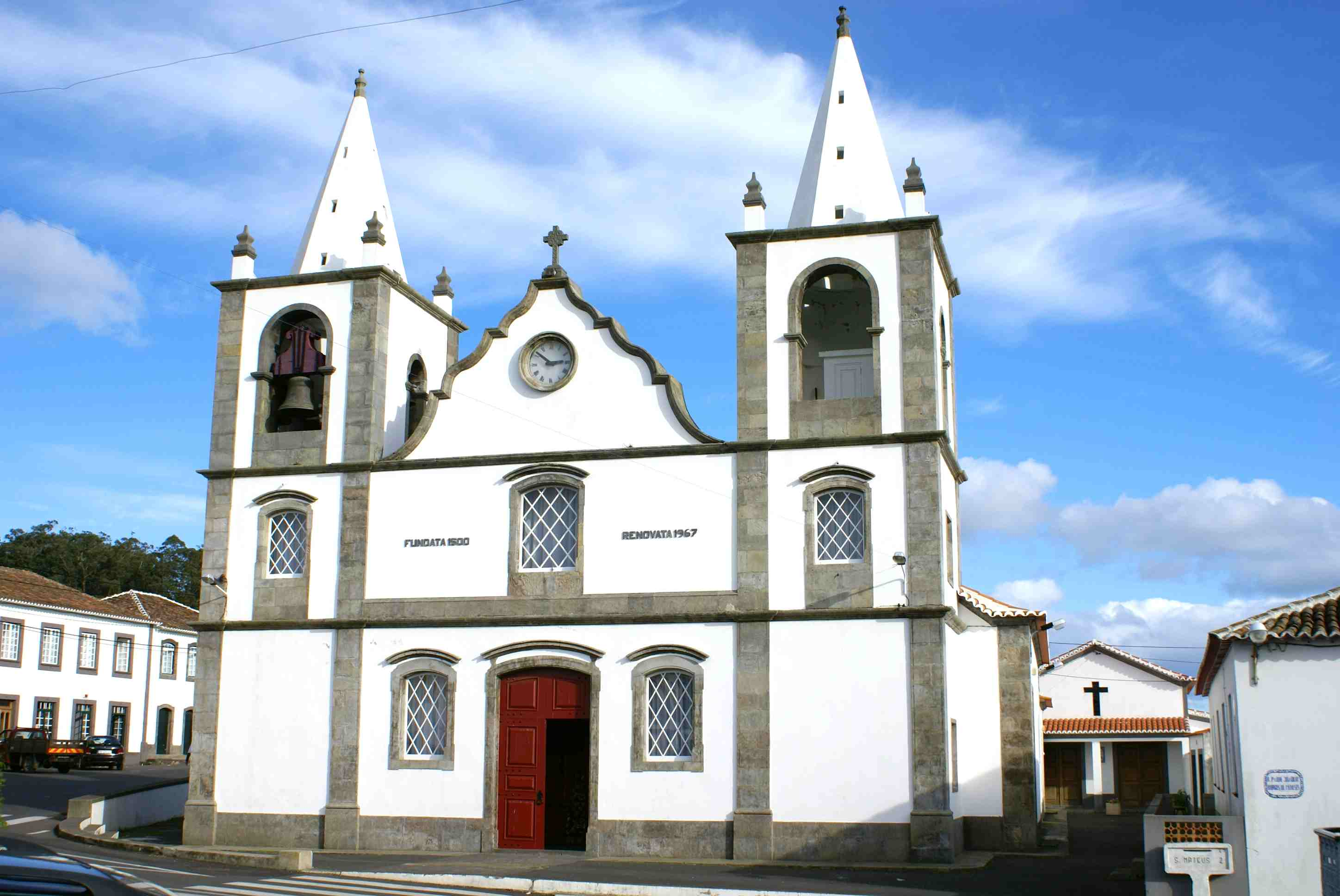 Igreja de São Bartolomeu, exterior, freguesia de São Bartolomeu de Regatos, Angra do Heroísmo, ilha Terceira, Açores, Portugal.